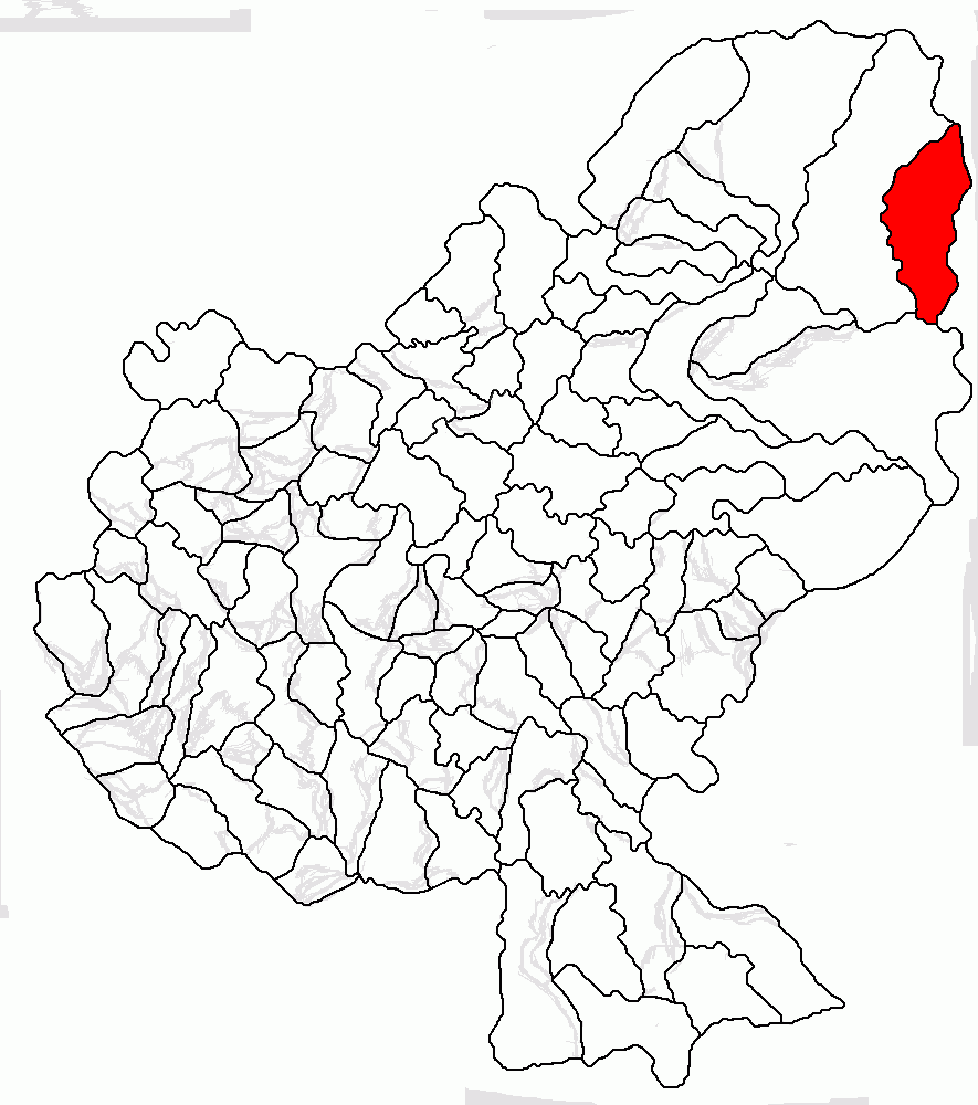 Categorie:Hărţi ale judeţului Mureş